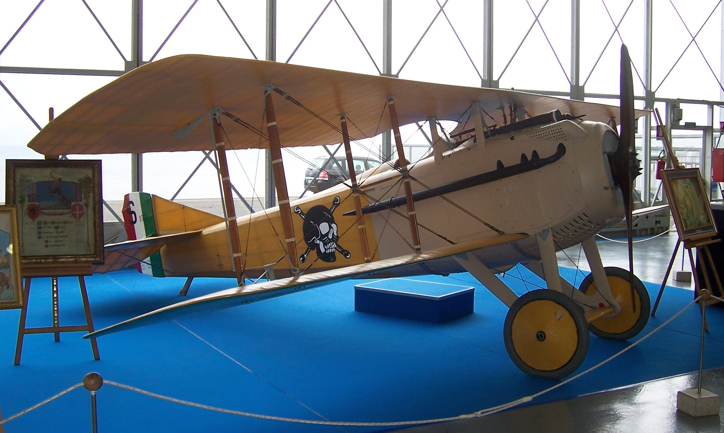 SPAD SVII des italienischen Piloten Fulco Ruffo di Calabria im Museo storico dell'Aeronautica Militare di Vigna di Valle